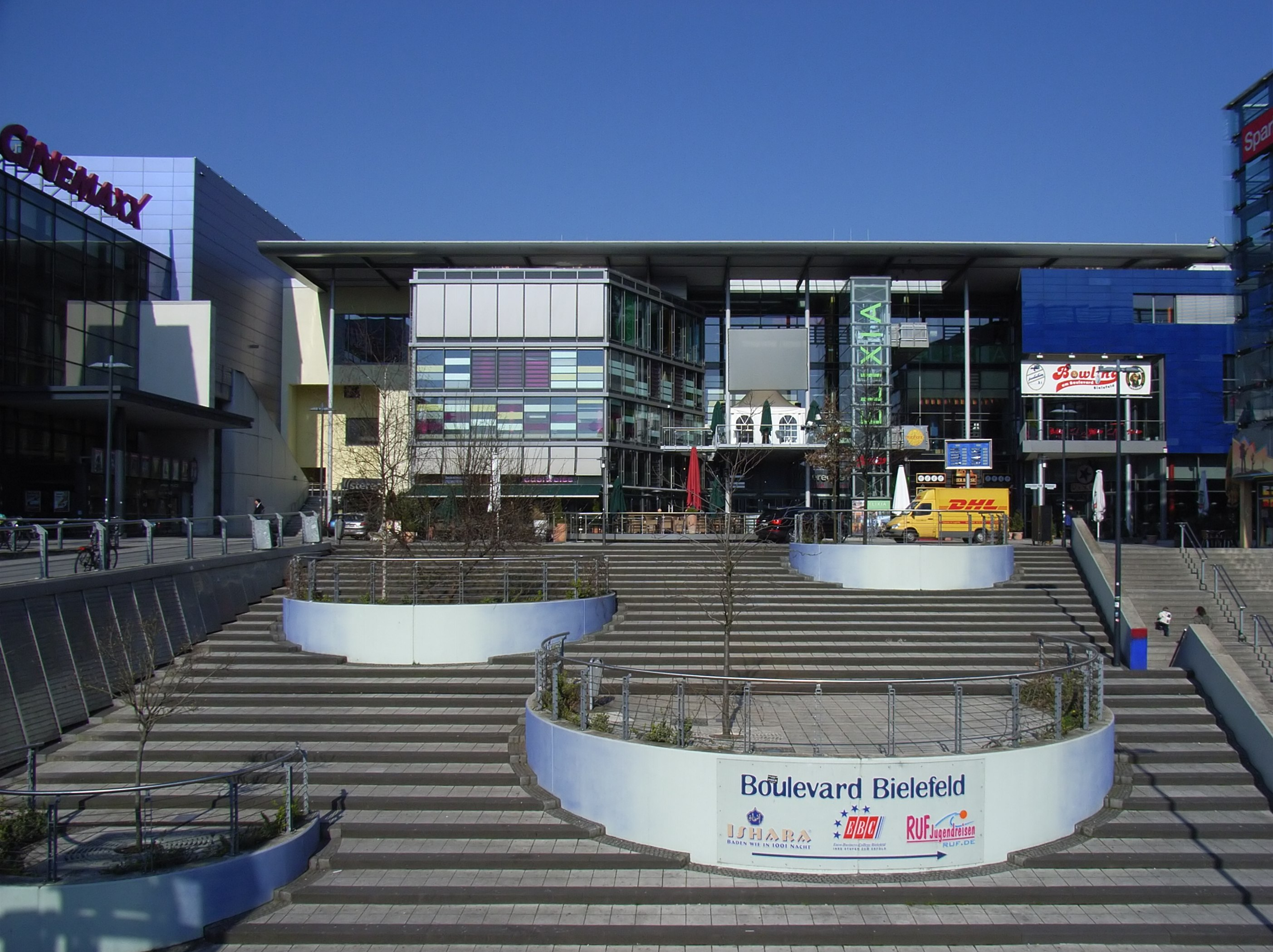 Bielefeld, Deutschland: Südwestliches Ende des Boulevards im Neuen Bahnhofsviertel.